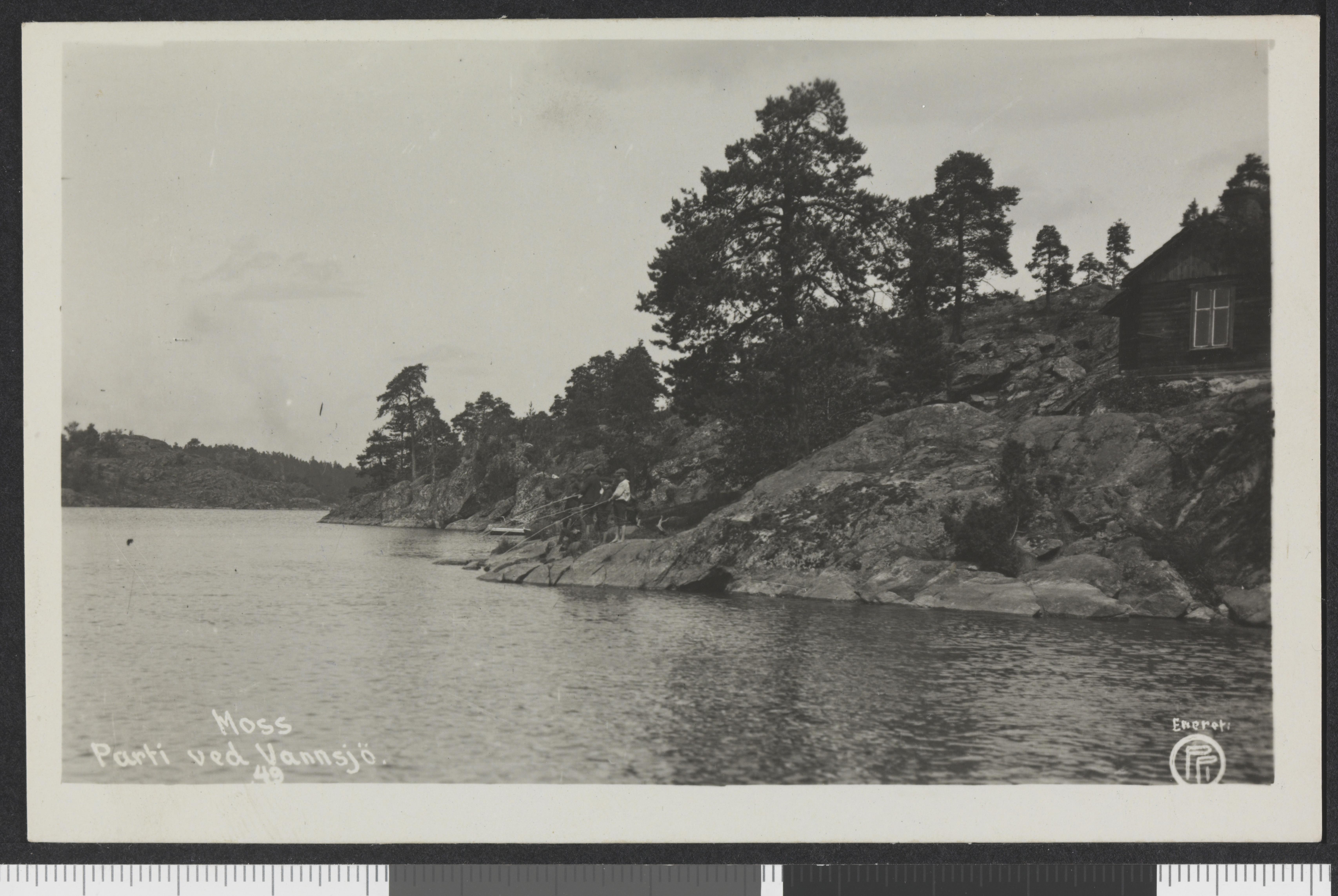 Bildet er hentet fra Nasjonalbibliotekets bildesamling Vannsjø, Moss, Østfold